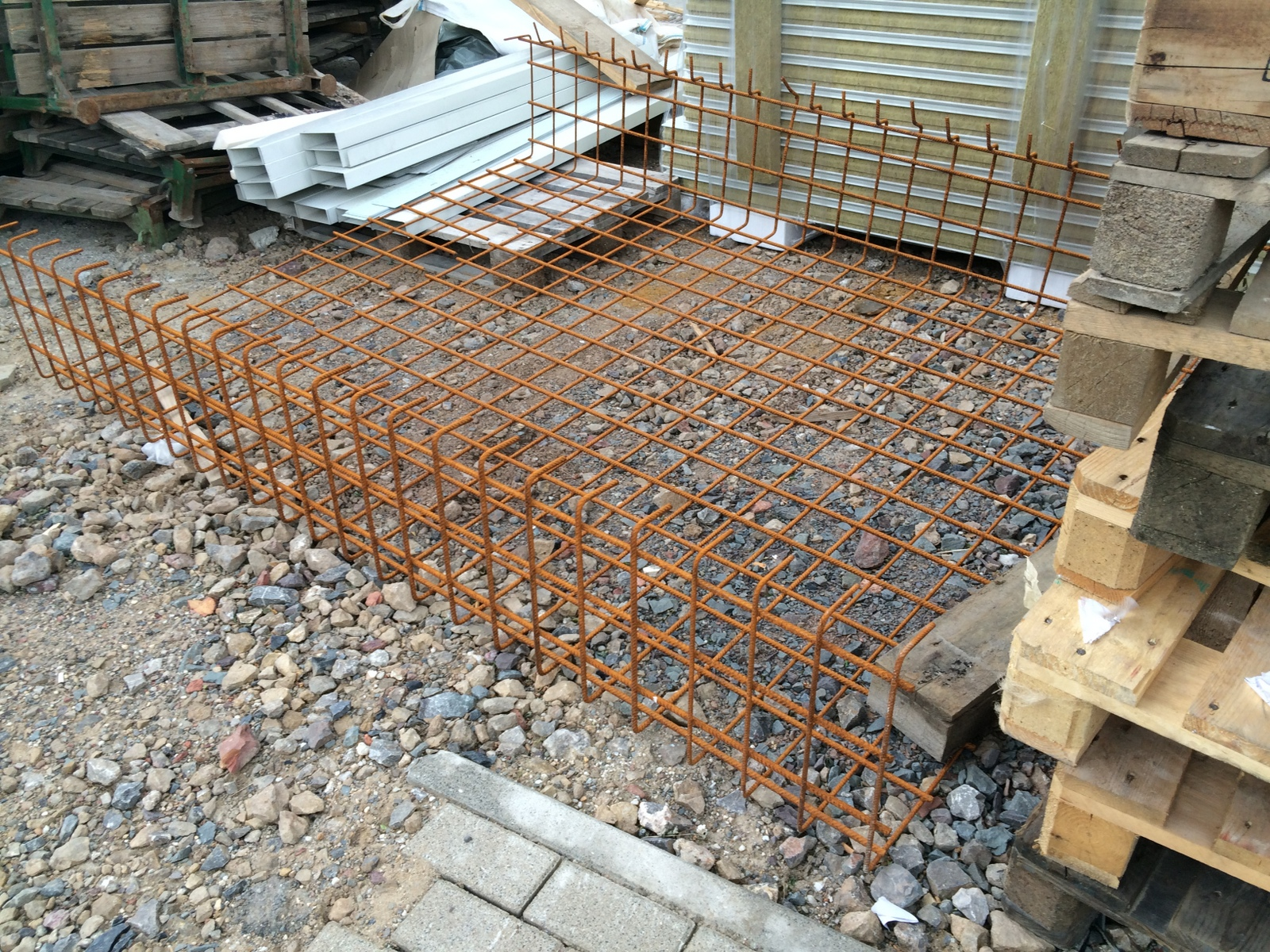 Bewehrungskorb Baustelle Marien Hospital Herne